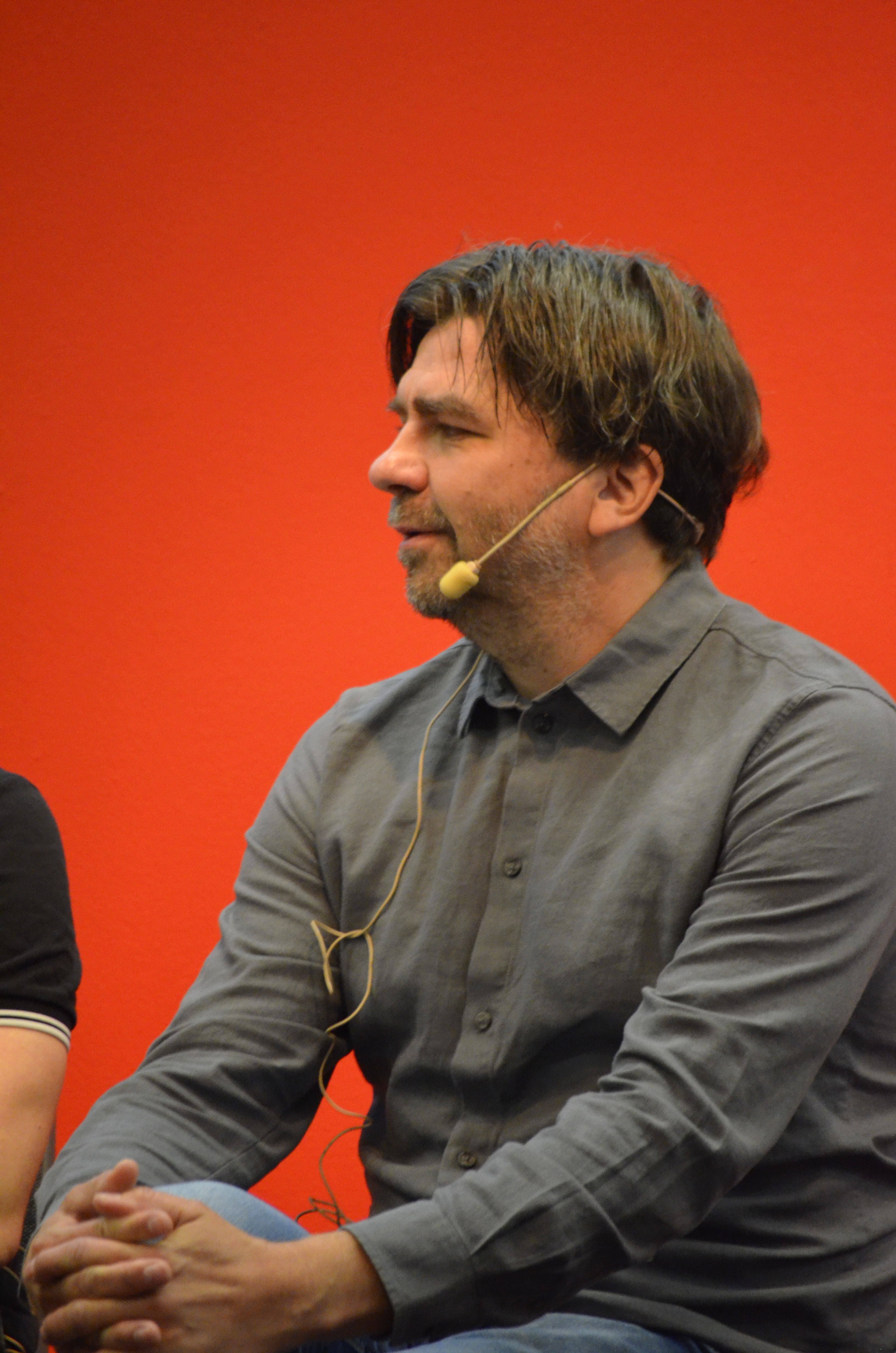 Thomas Arnroth Bokmässan Göteborg 2017